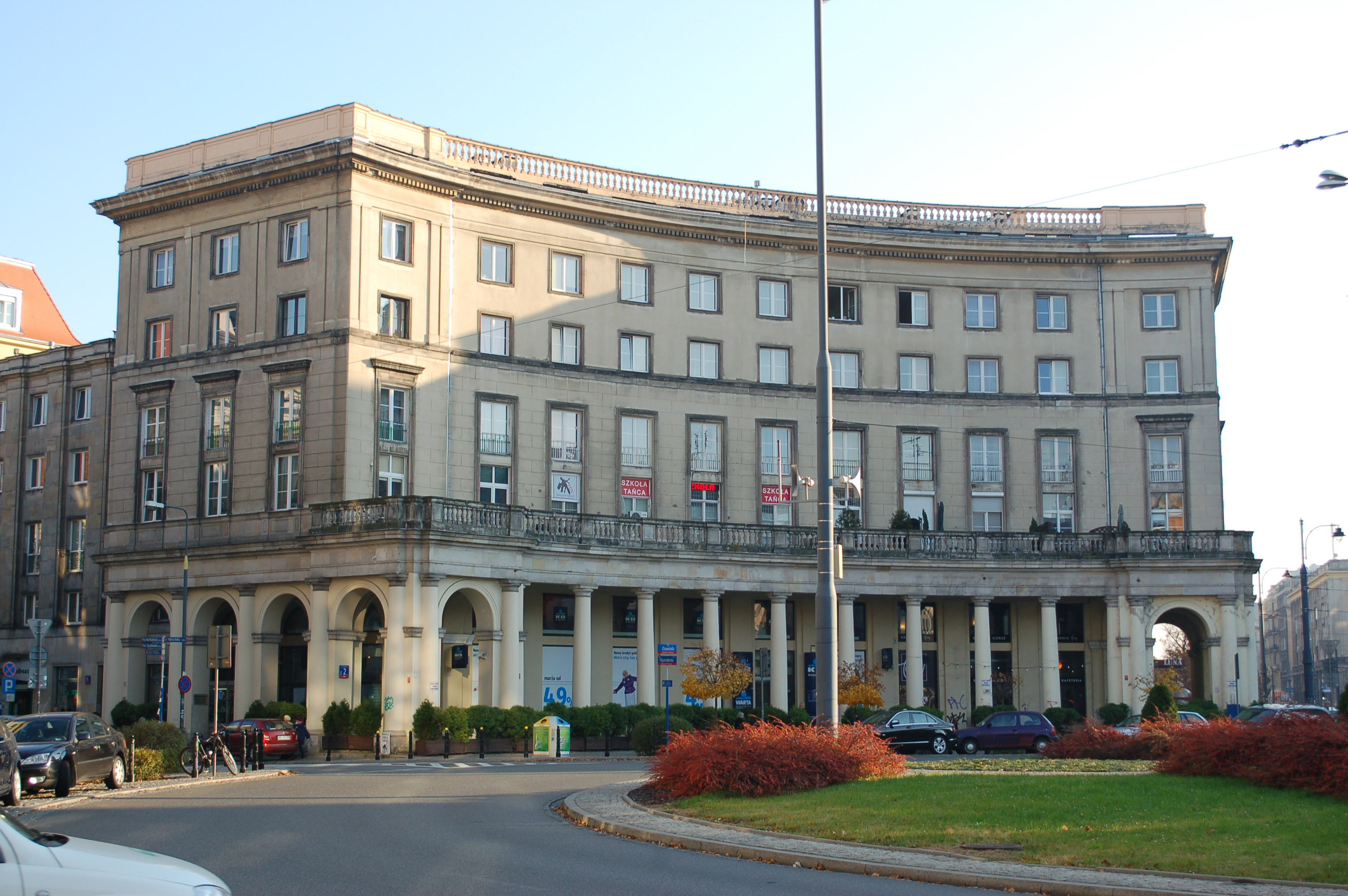 Plac Zbawiciela